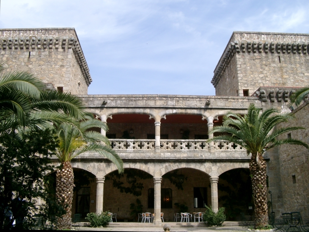 Castillo de los Condes de Oropesa Jarandilla de la Vera